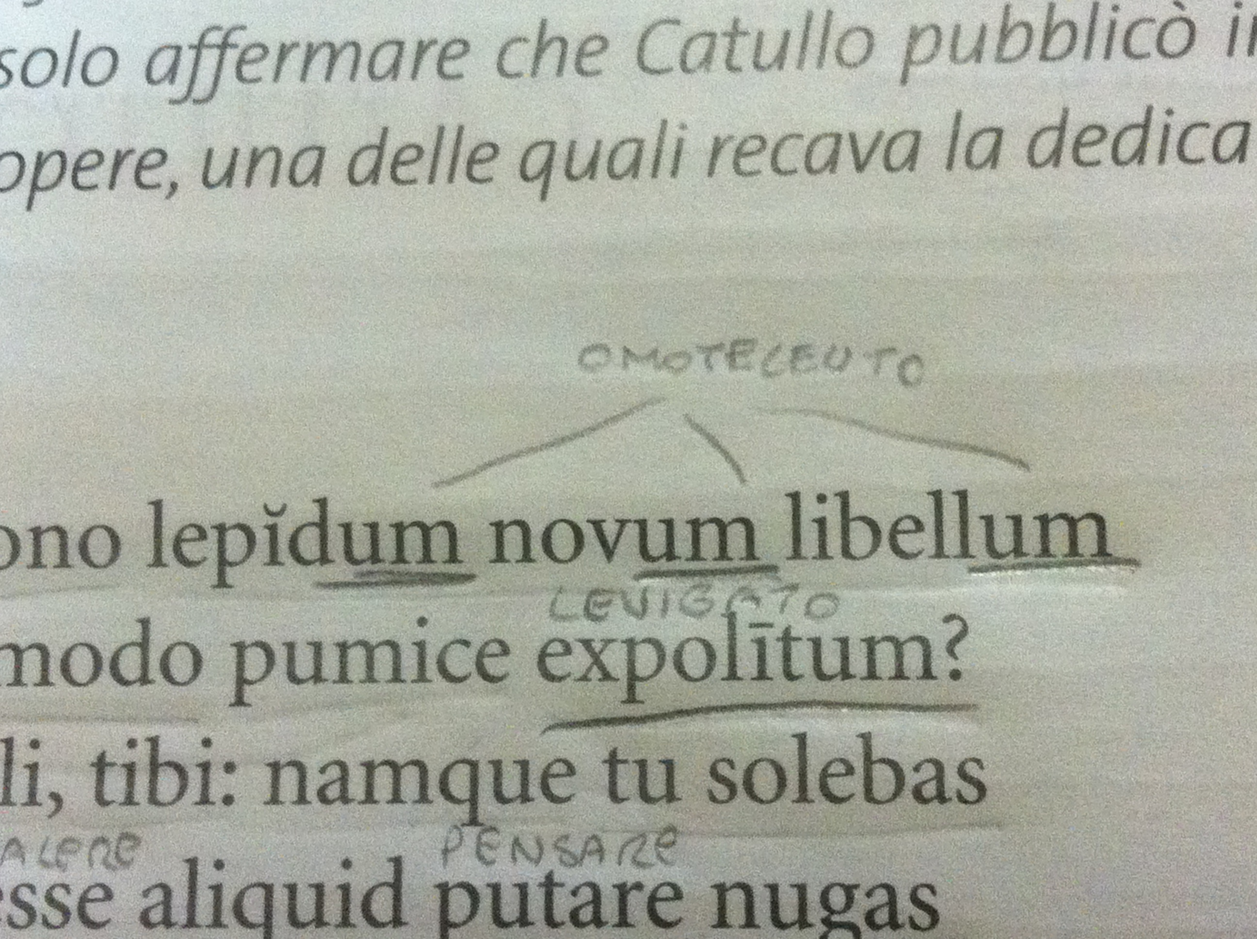 Tipico omoteleuto preso dal "liber" catulliano. ( carmina, 1 "dedica a cornelio nepote")